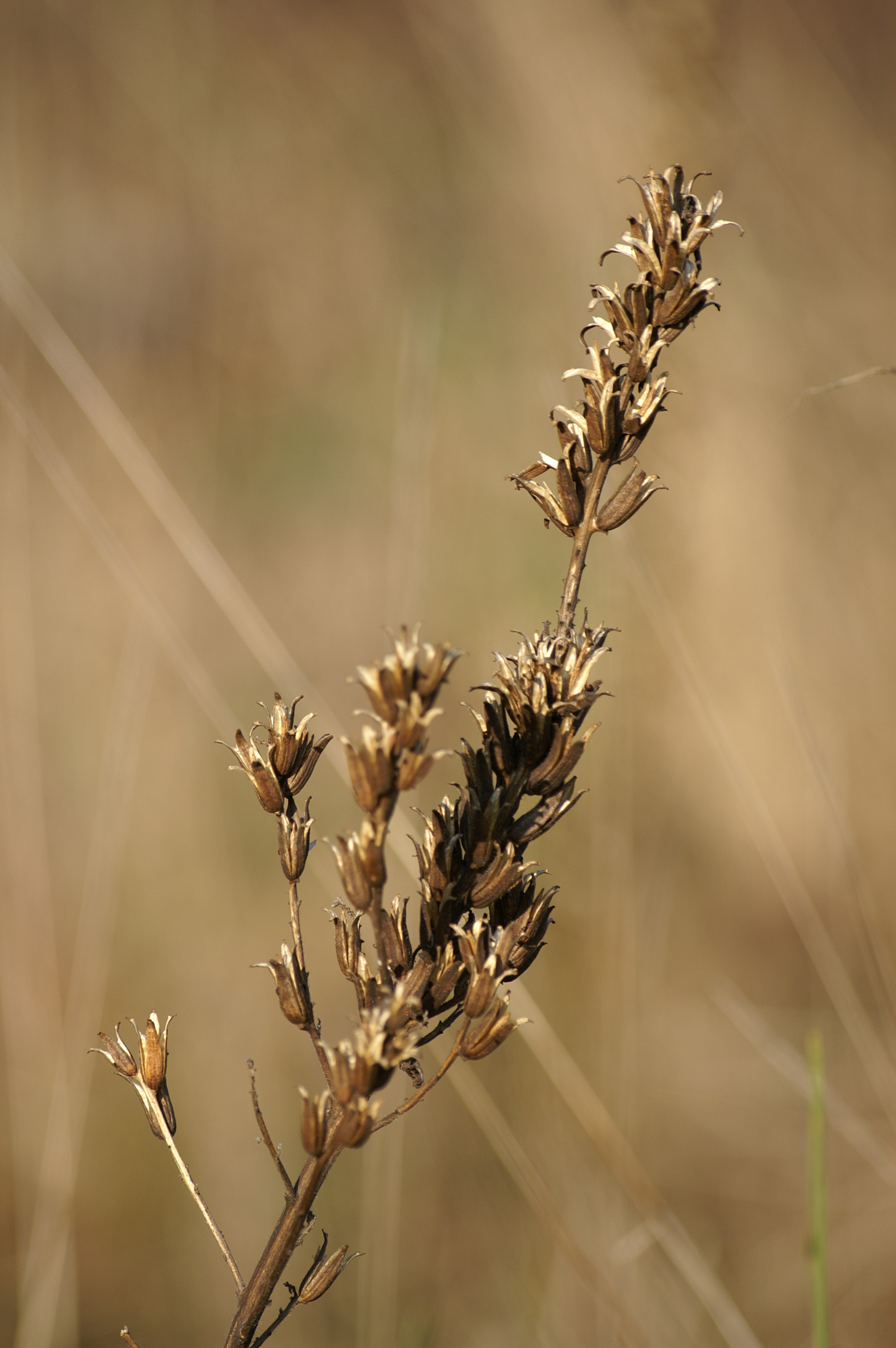 Objekt: Samenstand einer Gemeinen Nachtkerze (Oenothera biennis)